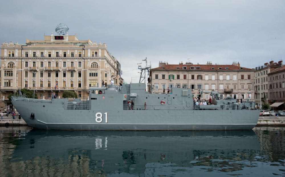 Dan HRM-a, Rijeka